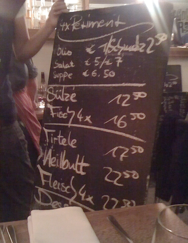 Tageskarten-Angebot in einem deutschen Restaurant (im ehemaligen Restaurant 4Experiment Gastraum in Hamburg) – hier als eine (temporär) mit Kreide beschriftete Schreibtafel, die im Lokal ausgehängt oder auf einem Ständer aufgestellt wird.